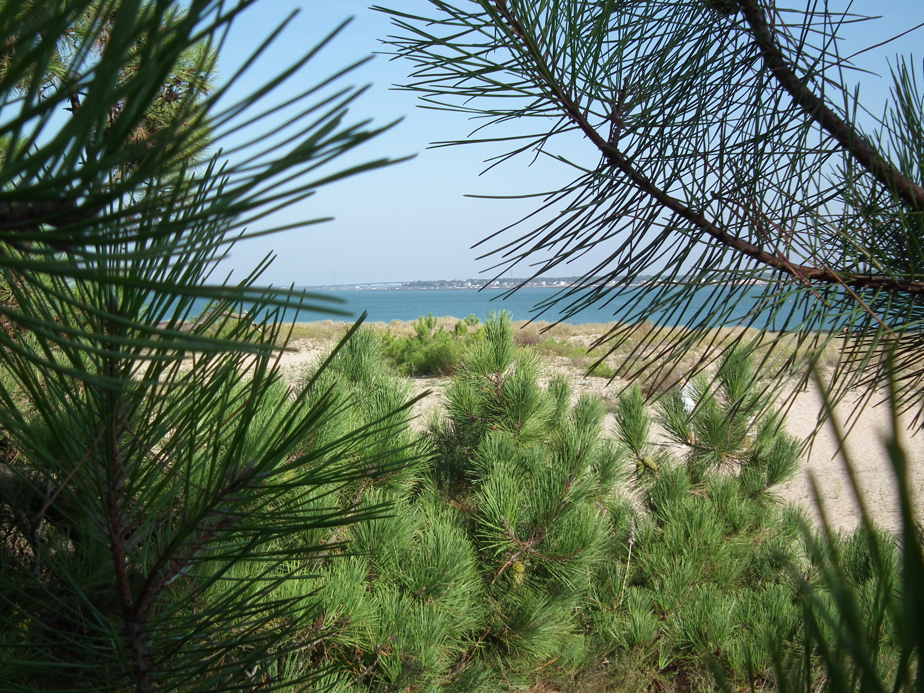 Plage de Gatseau